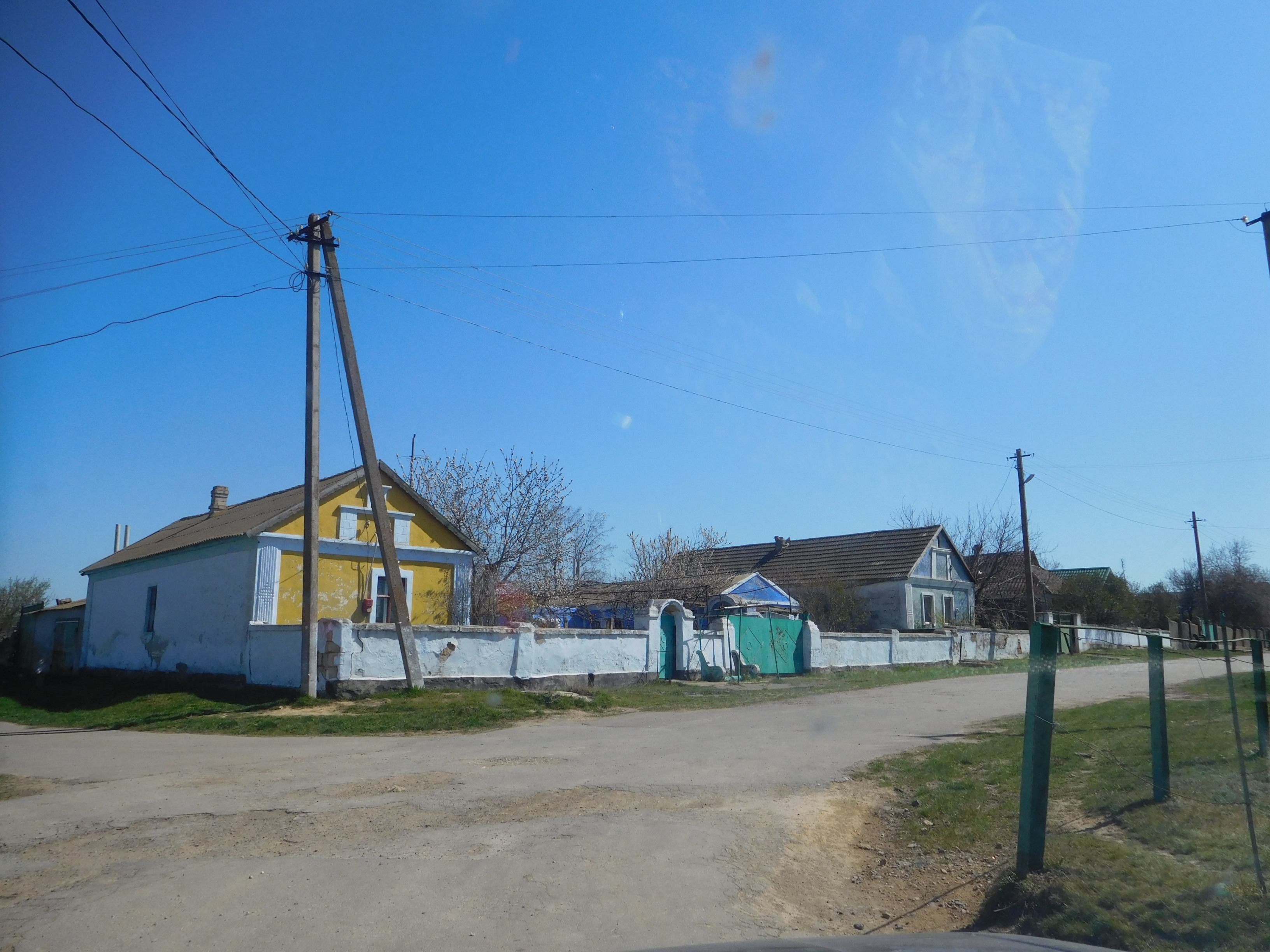 с. Черевичне, Міжлимання, Одеська область